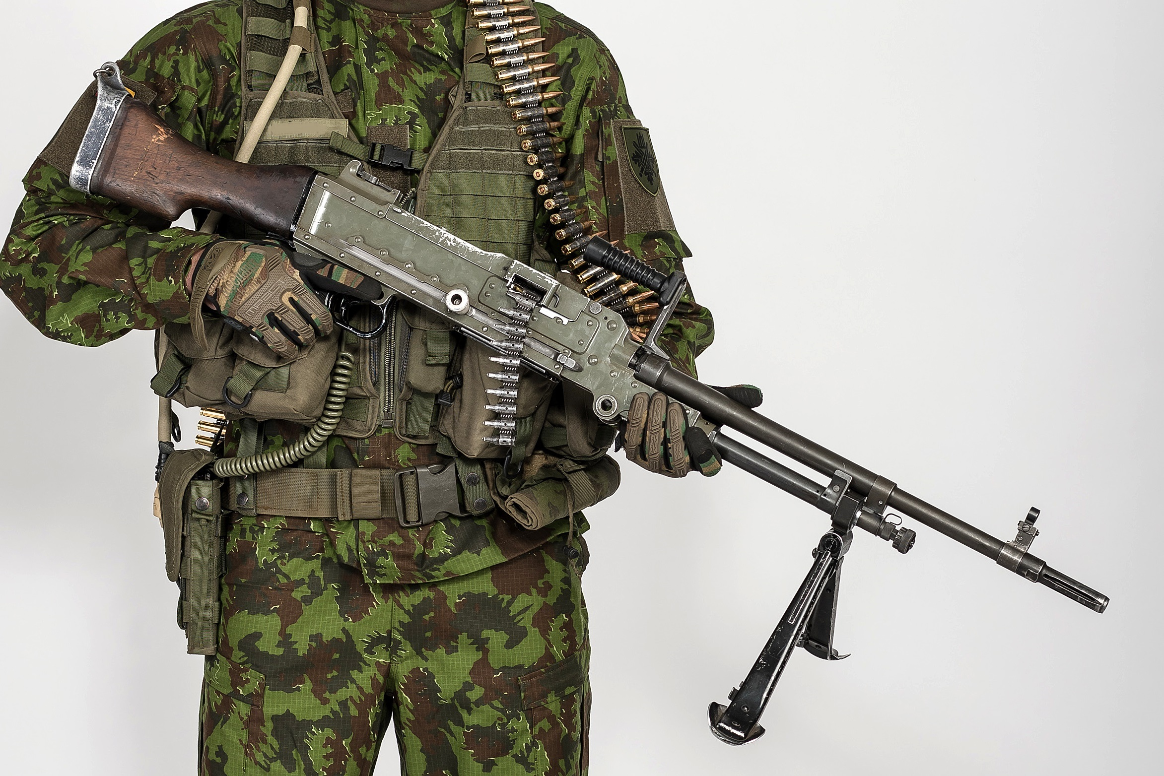 kulkosvaidis